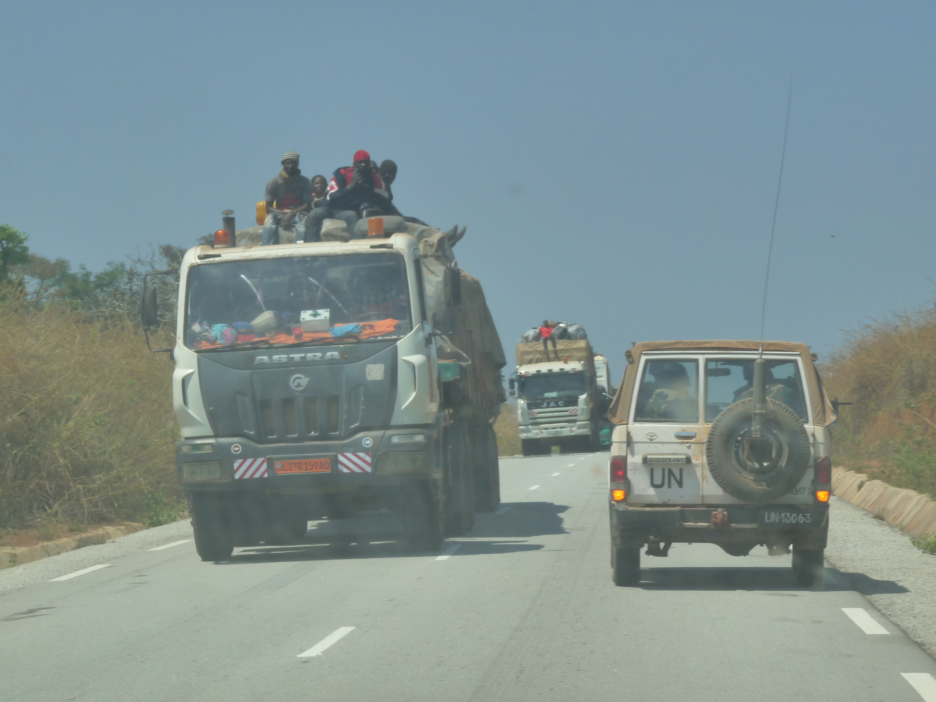 Camions chargés de marchandises et de passagers sur la route Bangui-Douala, Centrafrique.